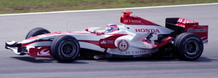 Takuma Sato driving for Super Aguri at the 2007 Malaysian Grand Prix.